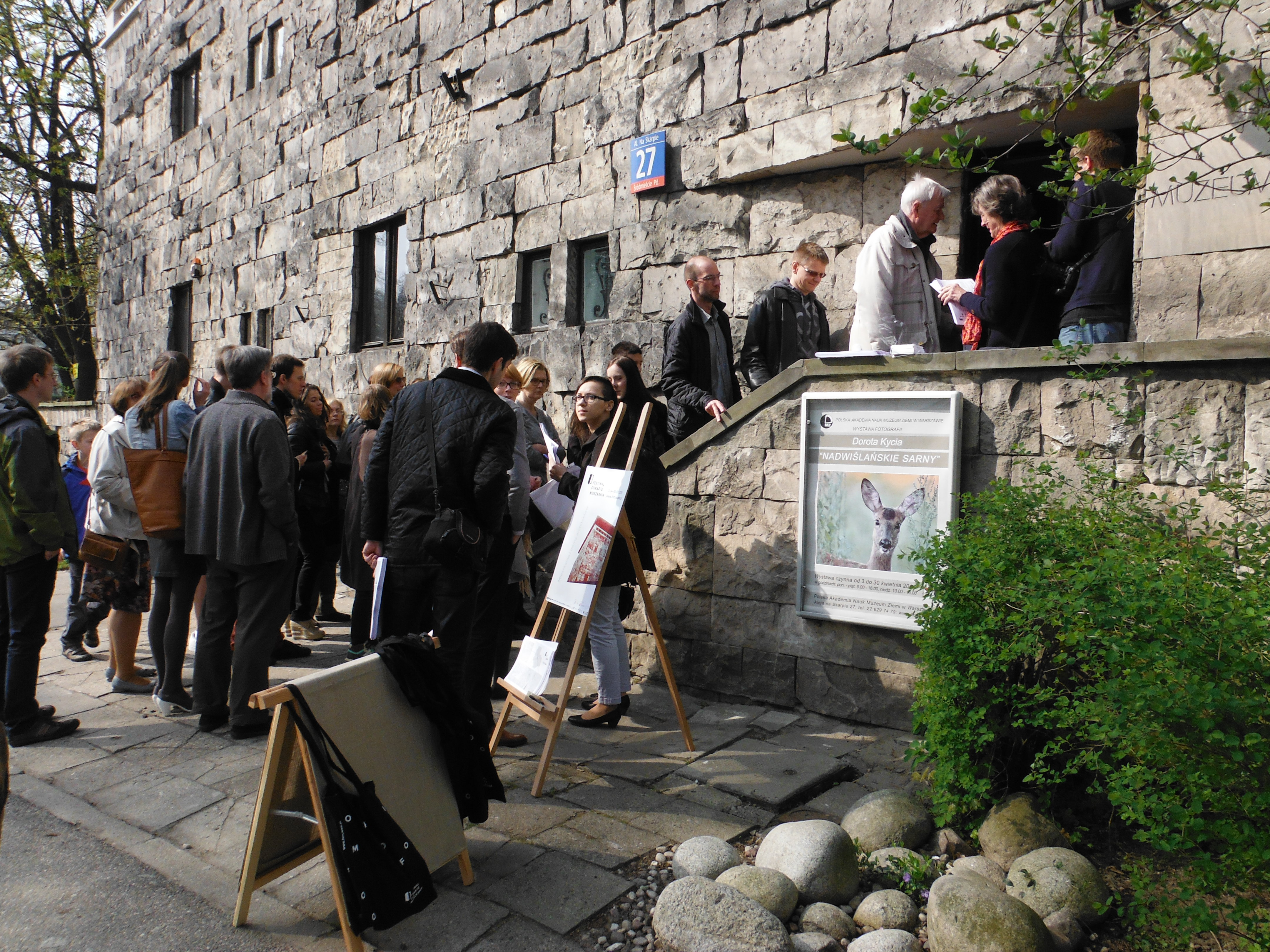 Kolejka do willi prof. Bohdana Pniewskiego - Festiwal Otwarte Mieszkania (2014).